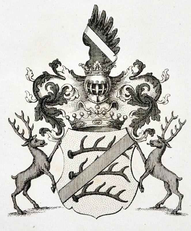 Wappen der Grafen von Sonteim (Württembergische Bastardlinie).